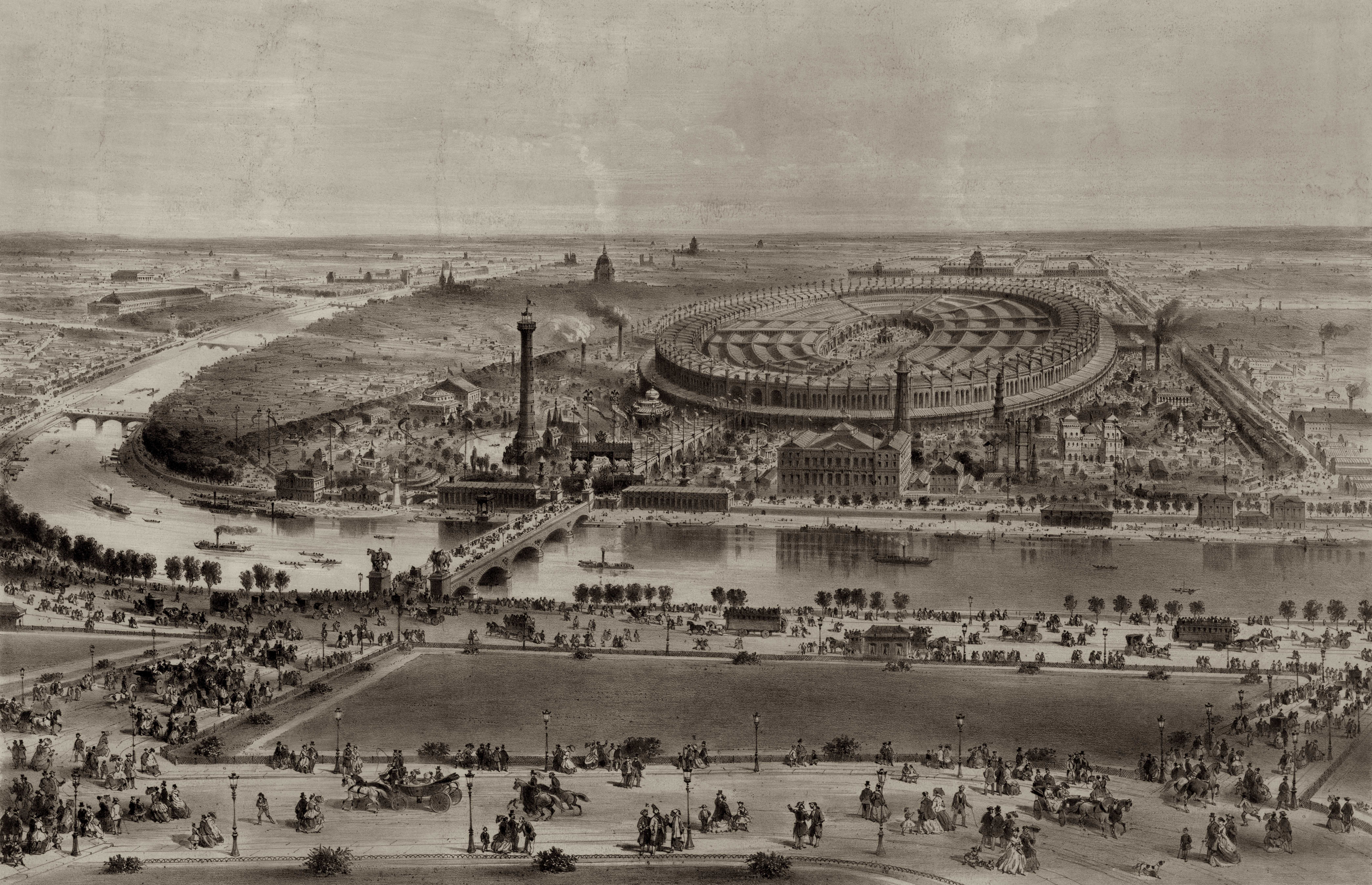 Exposition universelle de 1867, vue genérale prise des Hauteurs du Trocadero